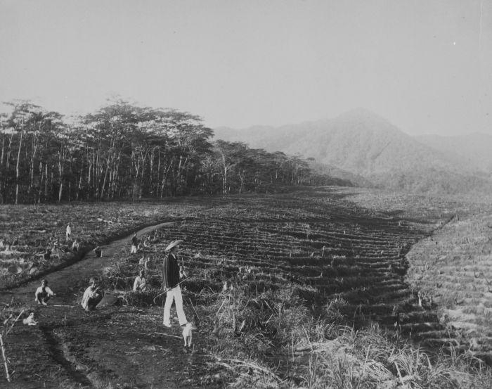 foto. Europeaan met Javaanse arbeiders aan het werk in de velden van de theeonderneming Kassomalang in de Pamanoekan- en Tjiasemlanden